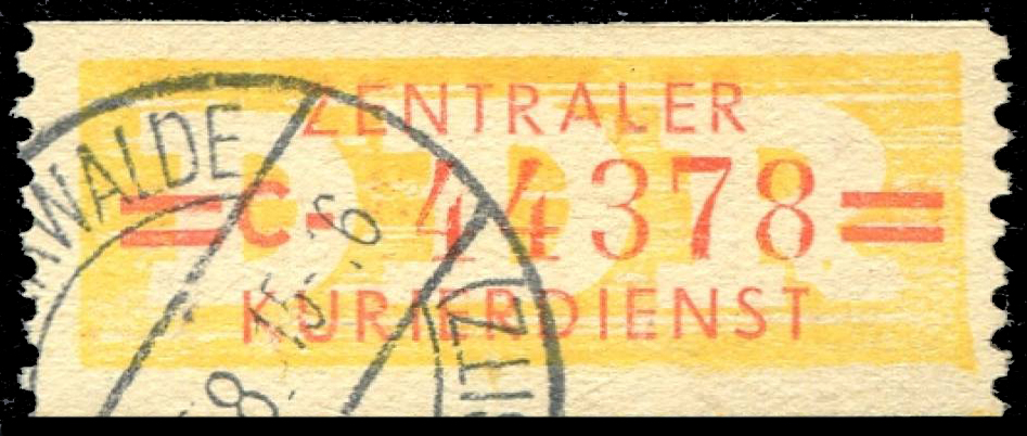 Специальная наклейка «полоска ЦКД» (ГДР)